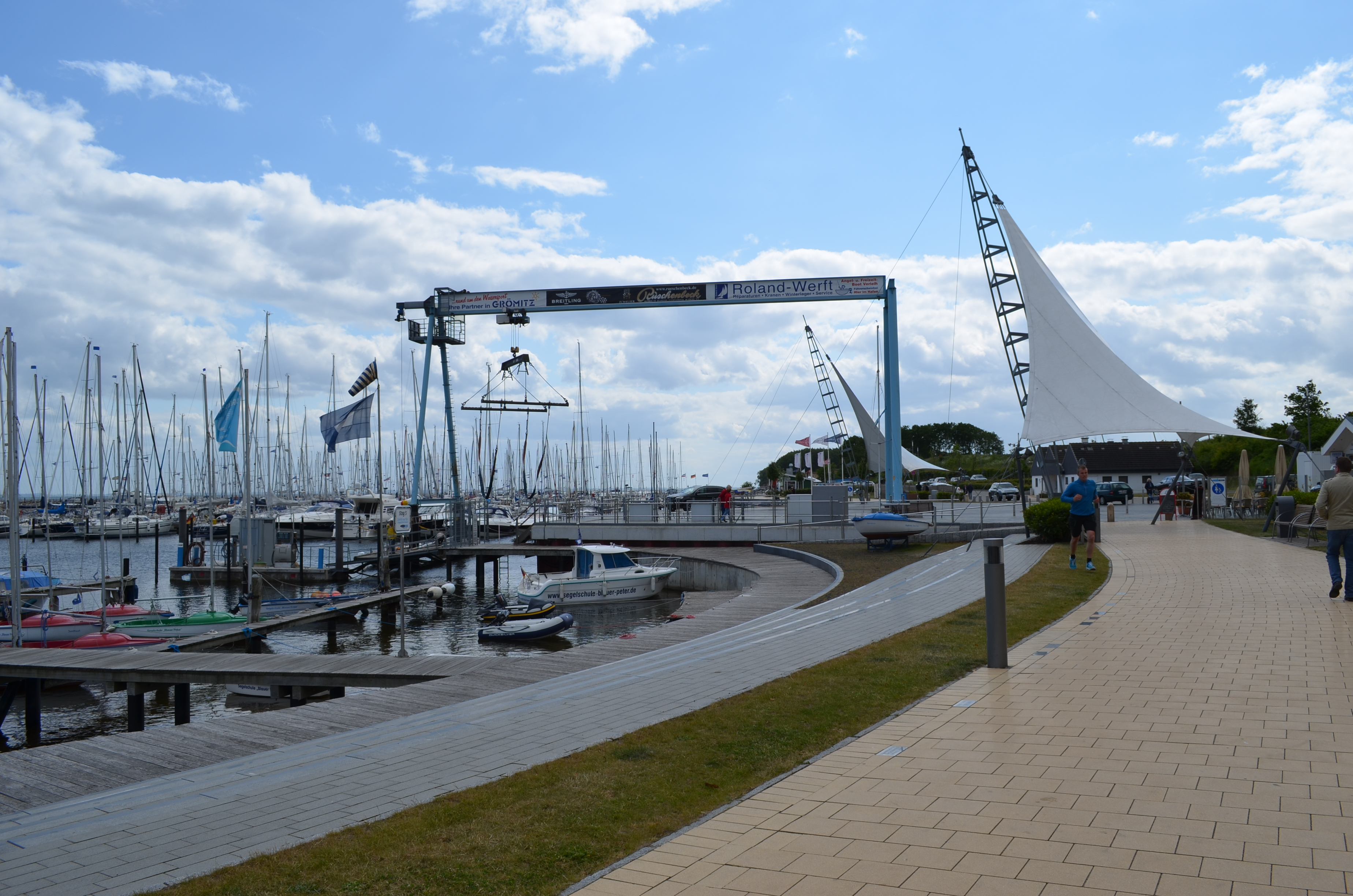 Grömitz, Roland Werft 2